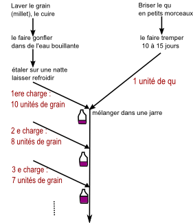 Schéma de la préparation du vin de millet d'après le Qi Min Yao Shu, 齐民要术 (+544)